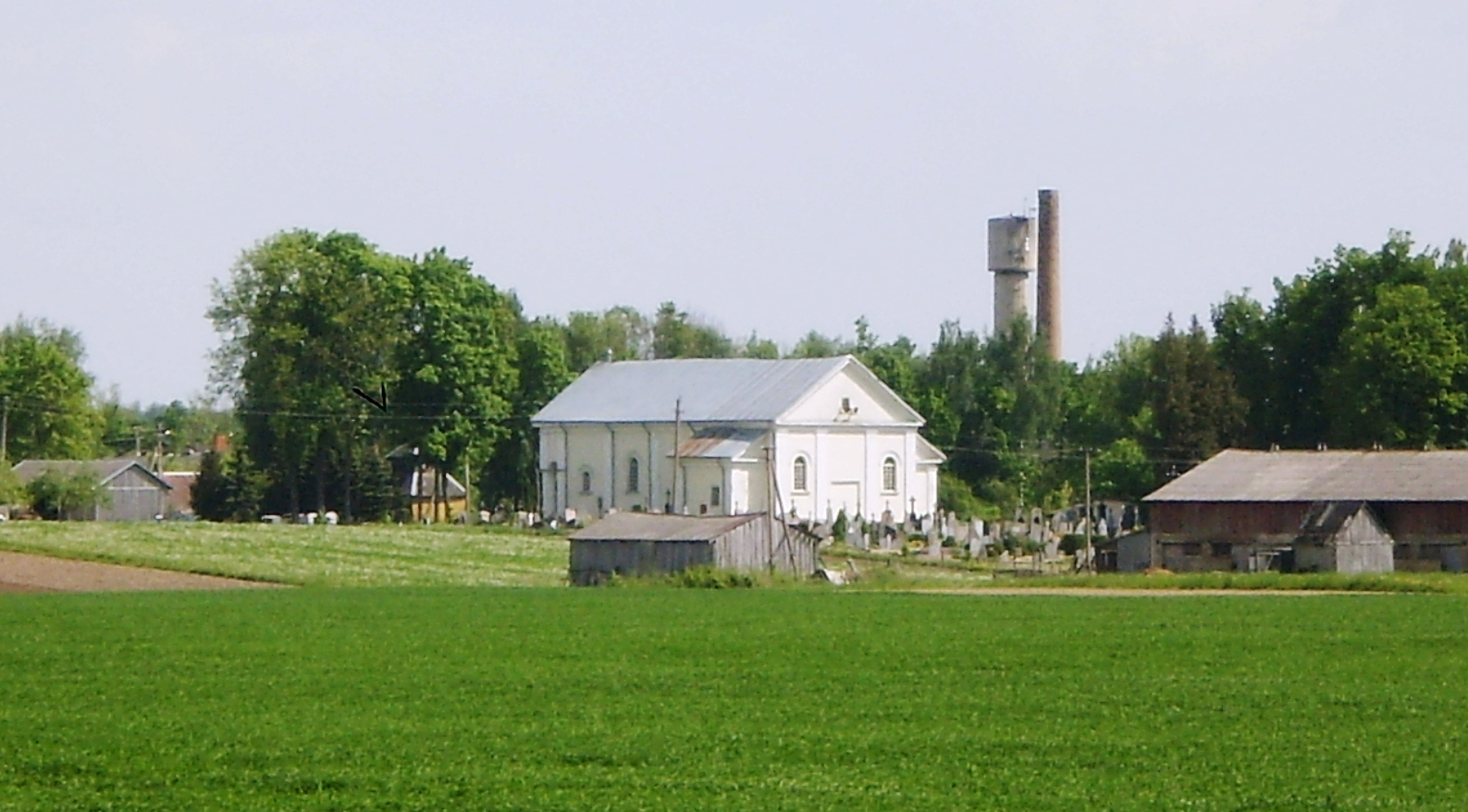 Šlapaberžė, bažnyčia, Kėdainių raj.